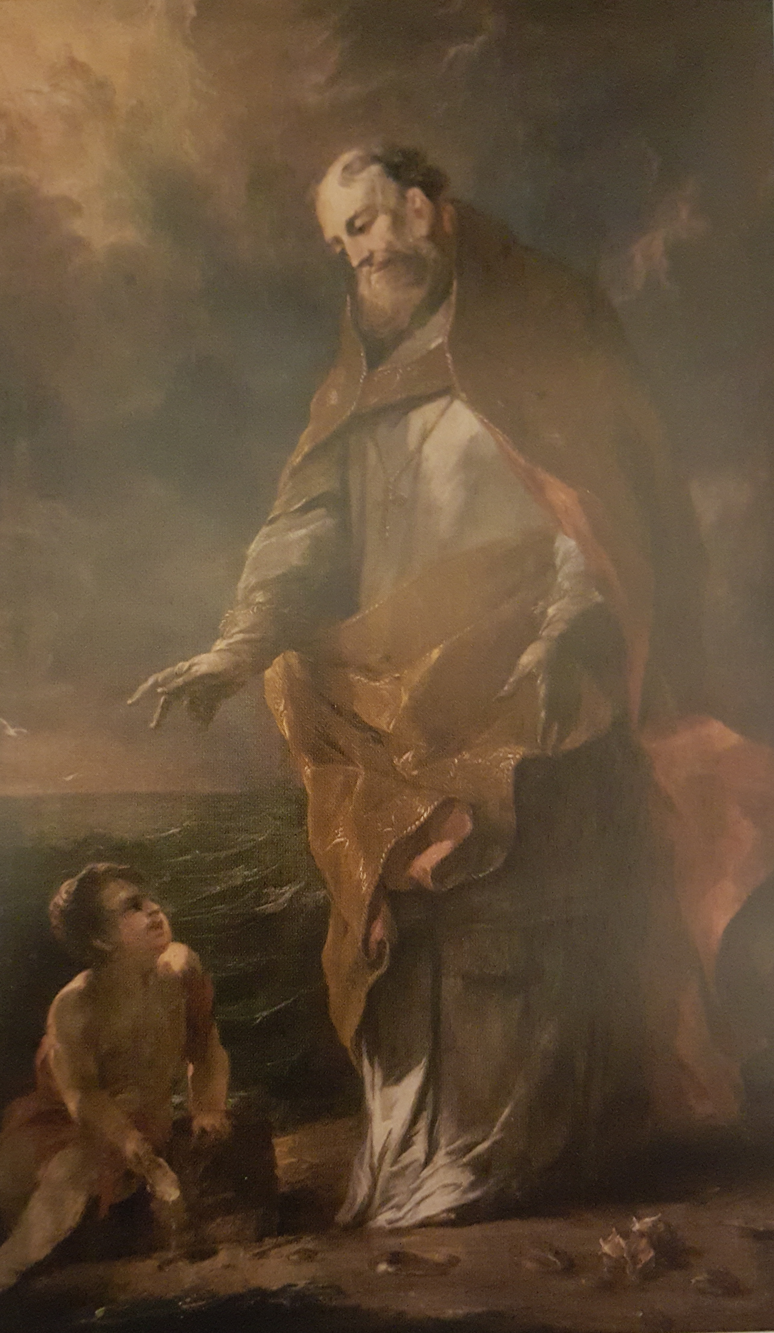 Święty Augustyn, Michael Willmann, 1696, Muzeum Narodowe we Wrocławiu